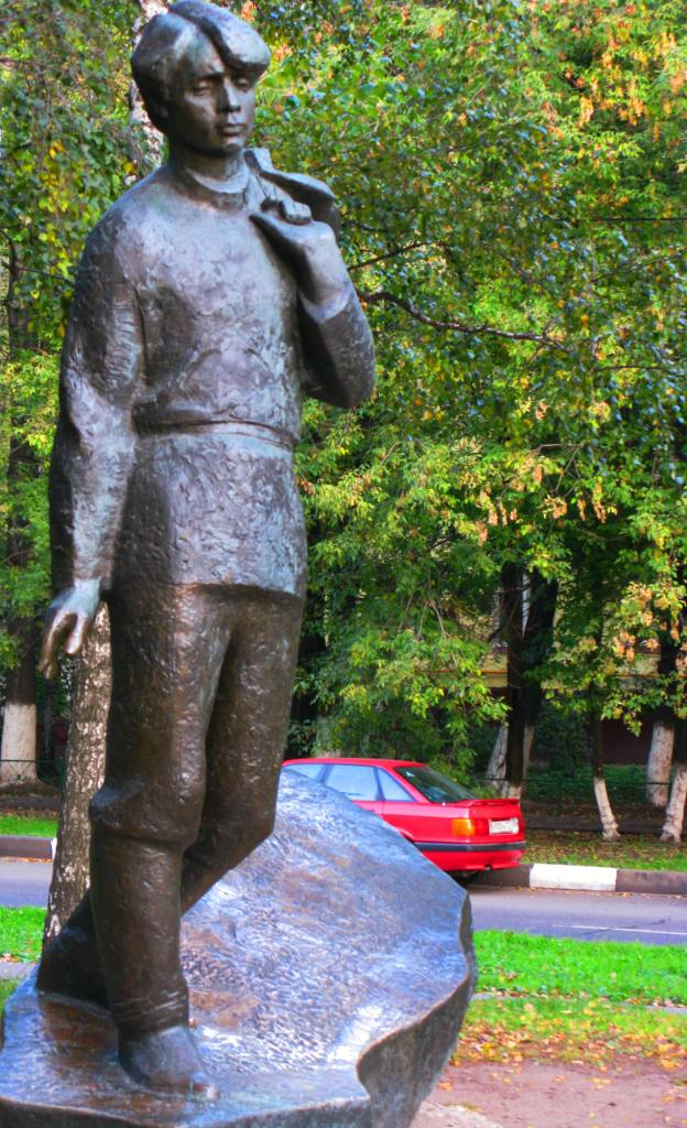 Есенинский бульвар, Кузьминки. Moscow, Russia.